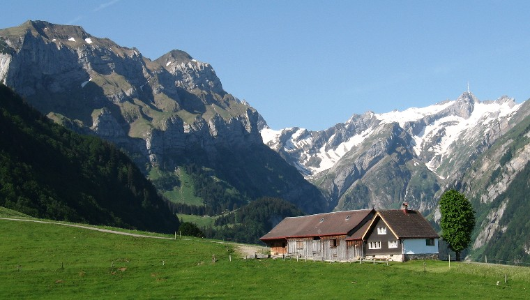 Der Grat des Marwees links, rechts der Säntis